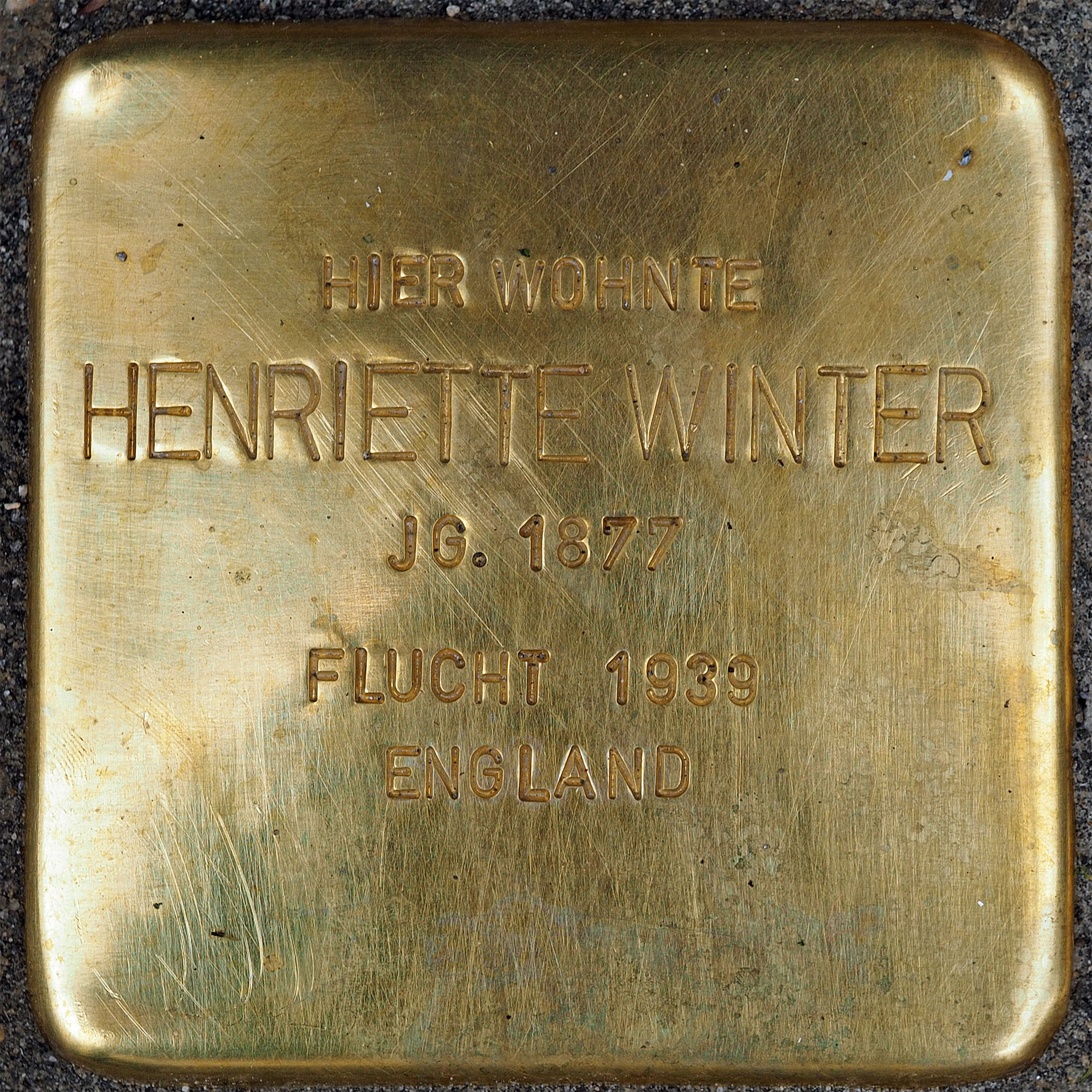 Stolpersteine Kempen: Winter, Henriette